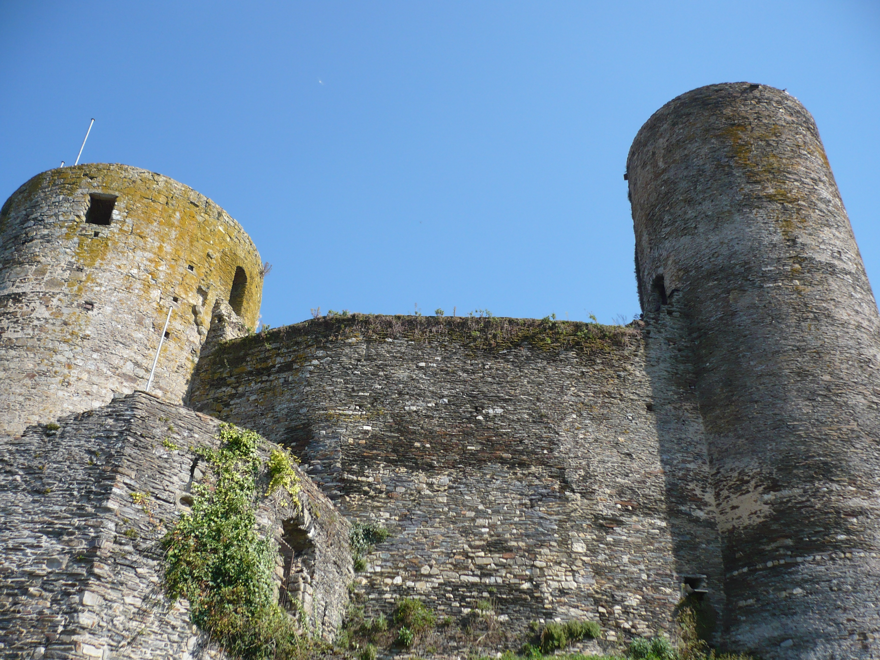 Courtine reliant la Grosse Tour (gauche) à la Tour de la Dame Blanche (droite) à Pouancé. Aperçu de la caponnière (en bas, à gauche).